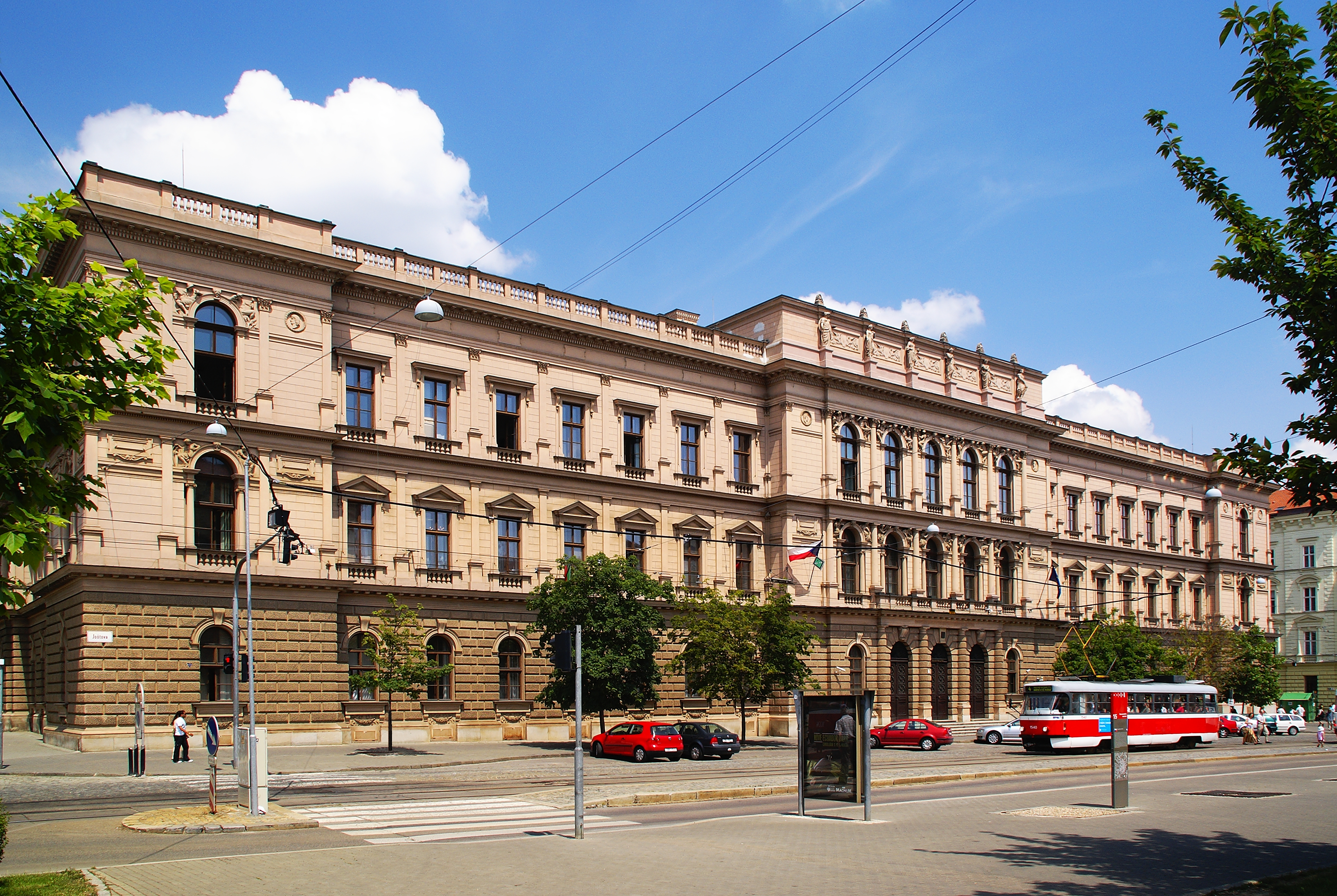 Ústavní soud (původně Zemská sněmovna, Zemský dům) v Joštově ulici v Brně.